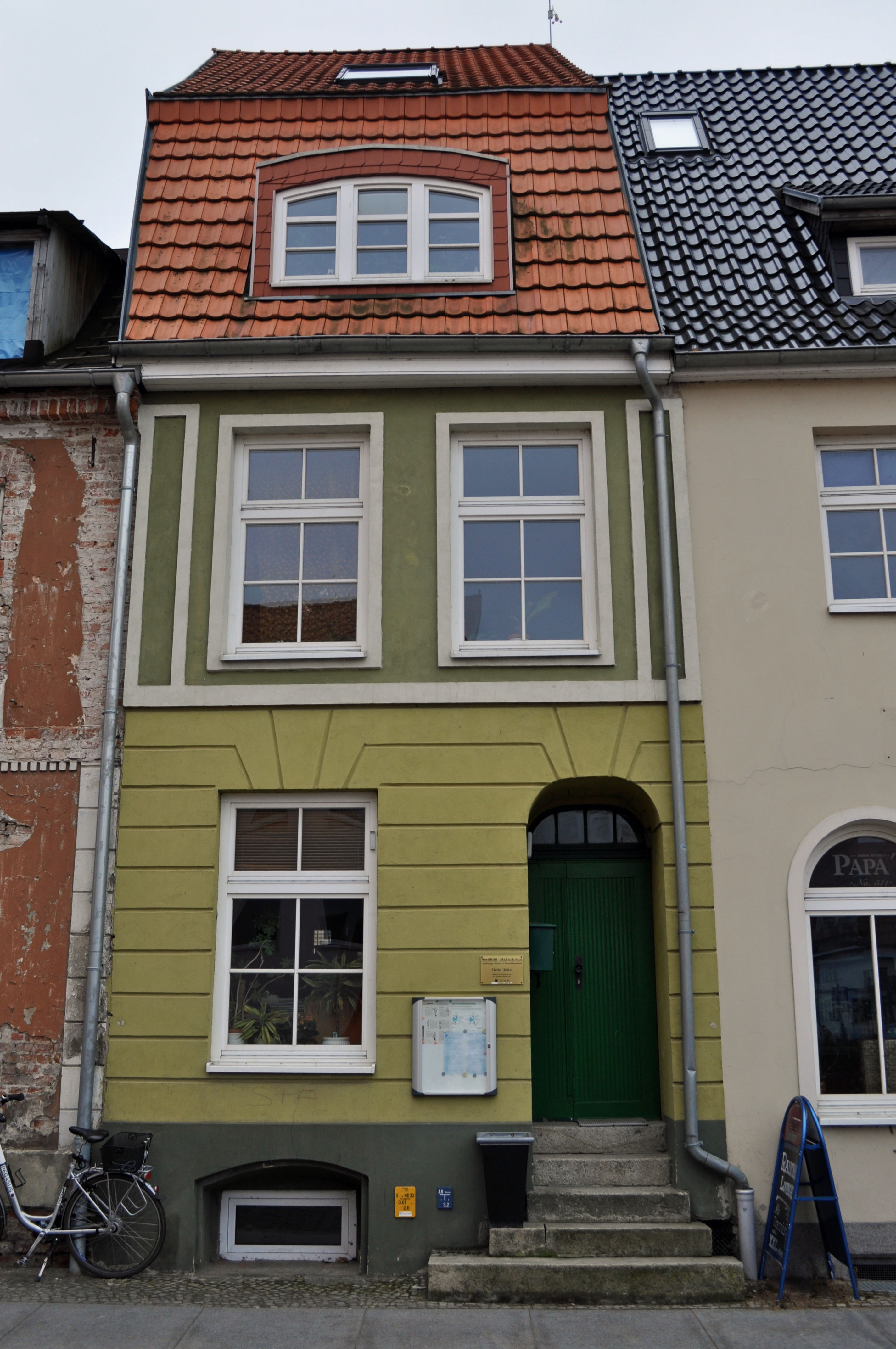 Gebäude bzw. Gebäudedetail in Stralsund. Straße und Hausnummer siehe Dateiname.